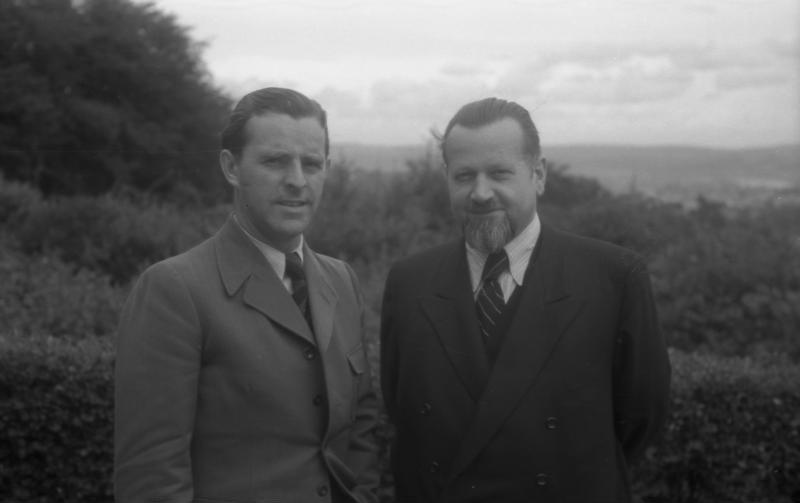 Ministerpräsidenten-Konferenz der Länder der 3 Westzonen Deutschlands auf dem Berghotel Rittersturz in Koblenz (v.l.n.r.: Otto Stübinger, Dr. Hans Haberer) 8.-10.7.1948